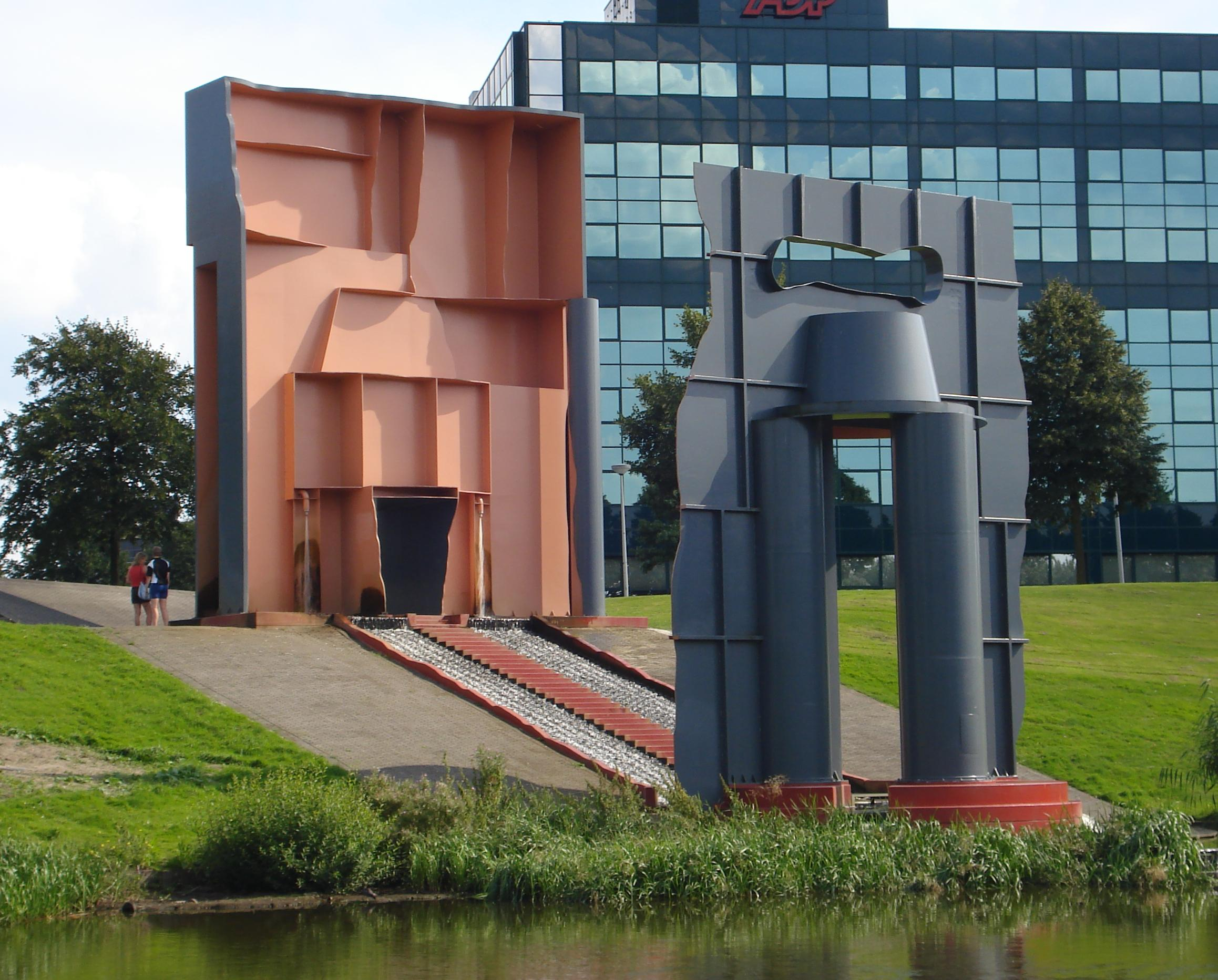 Rotterdam Brainpark, vijver. Kunstwerk "Sjatoodoo" van Kees Verschuren. Rotterdam/The Netherlands.